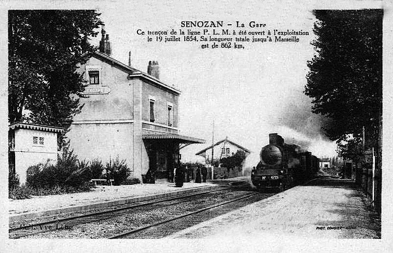 La gare de Senozan vers 1900